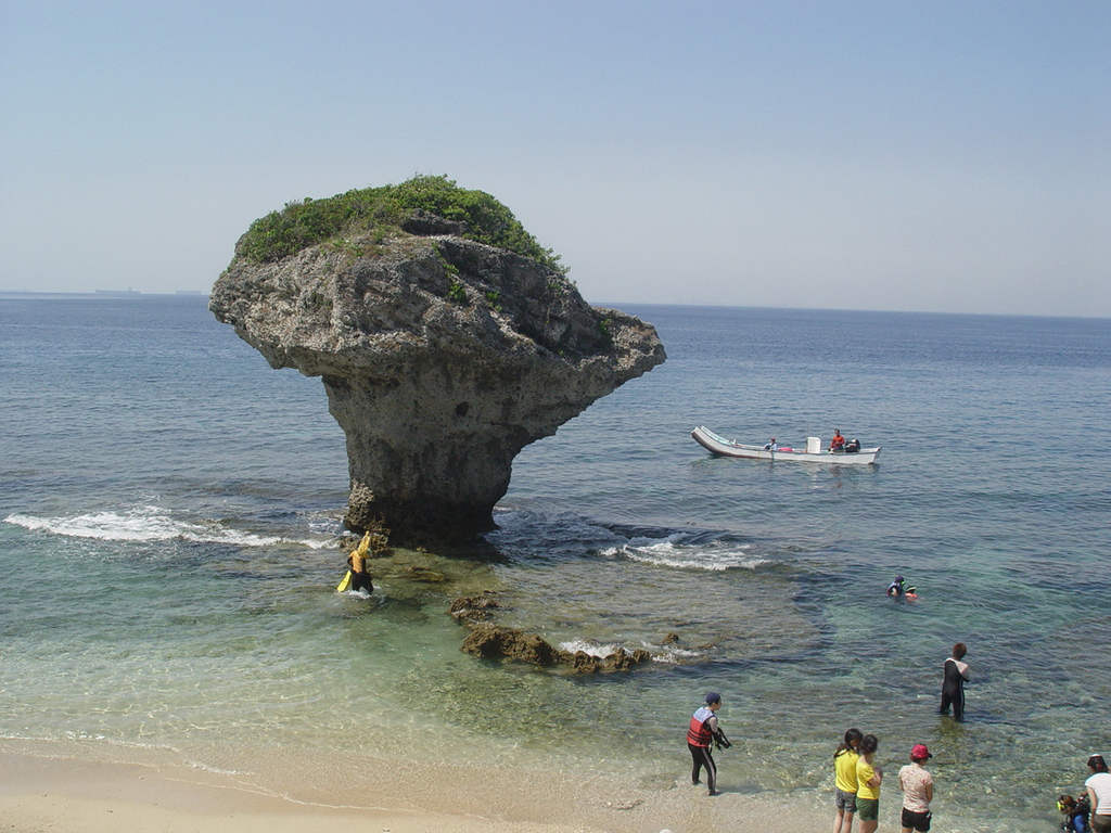 花瓶石是臺灣屏東縣琉球鄉的地標景觀。